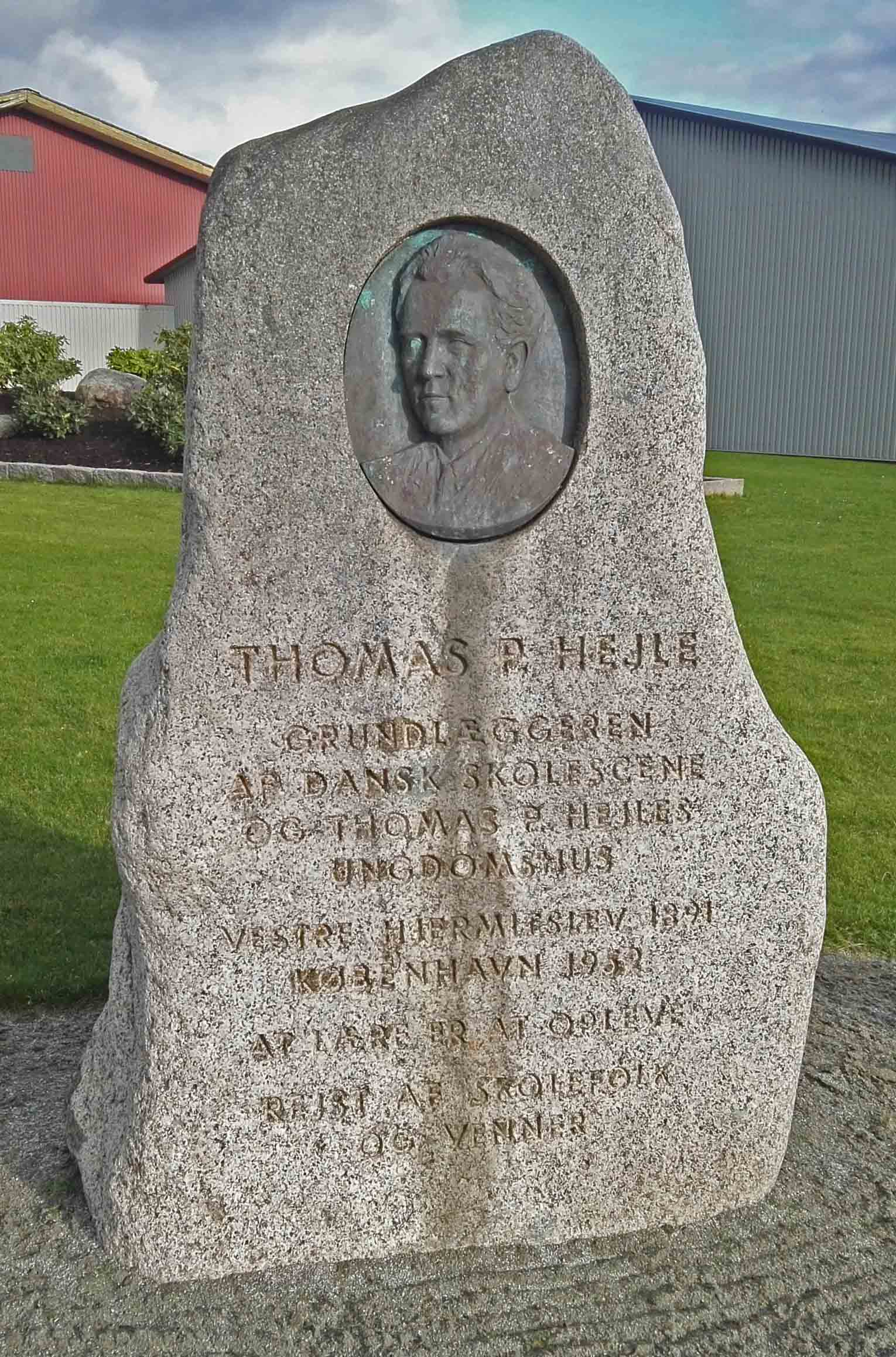 Mindesten for Thomas P. Hejle på Vester Hjermitslev Torv med inskriptionen:Grundlæggeren af Dansk Skolescene og Thomas P. Hejles UngdomshusVestre Hiermerslev 1891København 1952At lære er at opleveRejst af skolefolk og venner